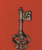 Stendardo del Rione Santa Maria